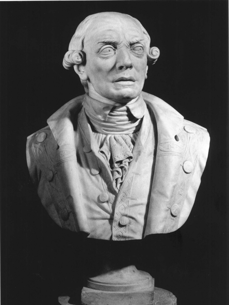 Busto di Angelo Emo, opera di Pietro Zandomeneghi (1862-1863). Il busto fa parte del Panteon Veneto, conservato presso Palazzo Loredan di Campo Santo Stefano a Venezia.